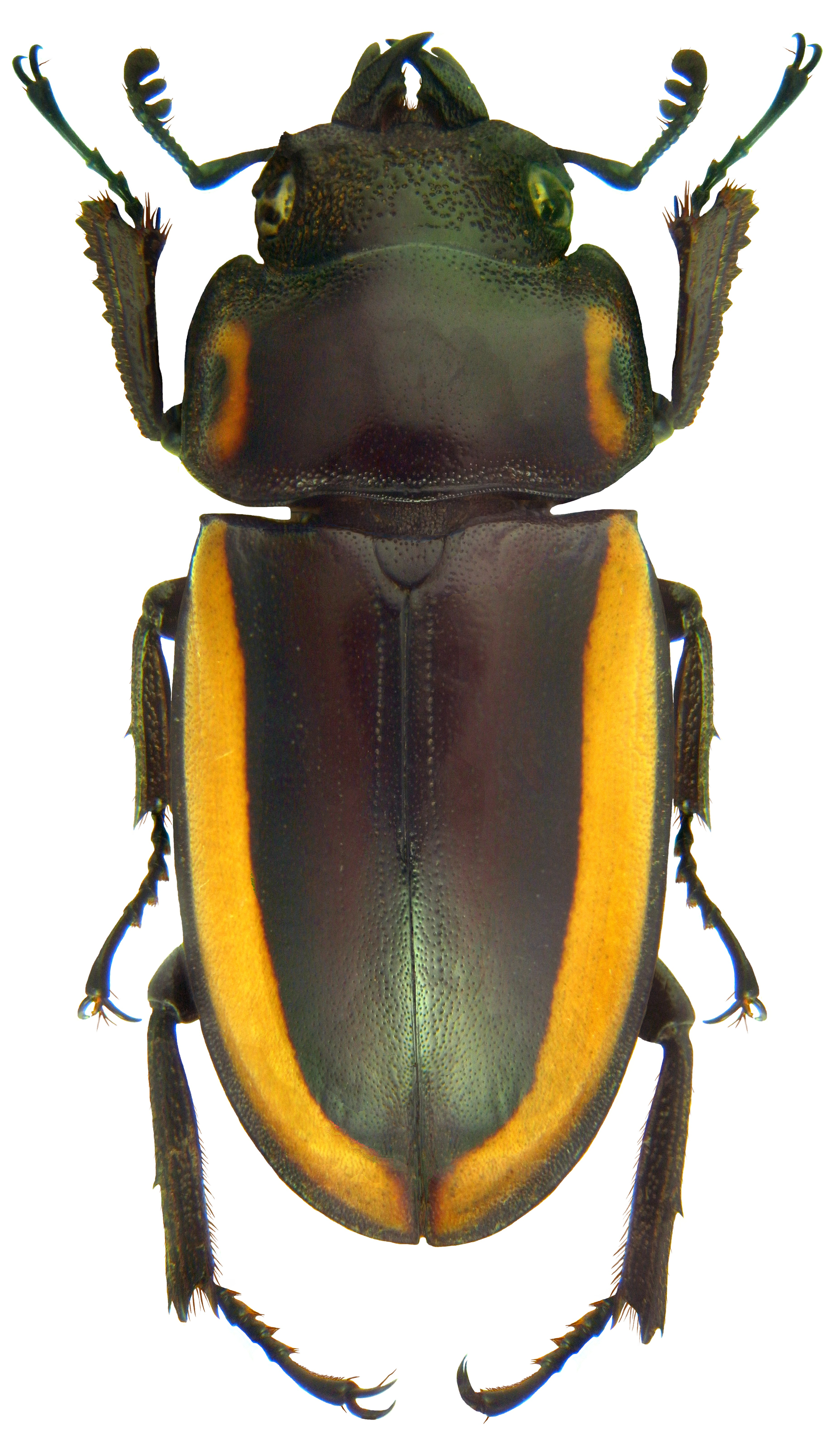 Familie: Lucanidae Groesse: 24 mm Verbreitung: Indonesien (Irian Jaya) Fundort: Indonesien, Kei-Islands, Tual, Ohoidertawun leg. A.Weigel, 2011; det. U.Schmidt, 2011 Photo: U.Schmidt, 2011